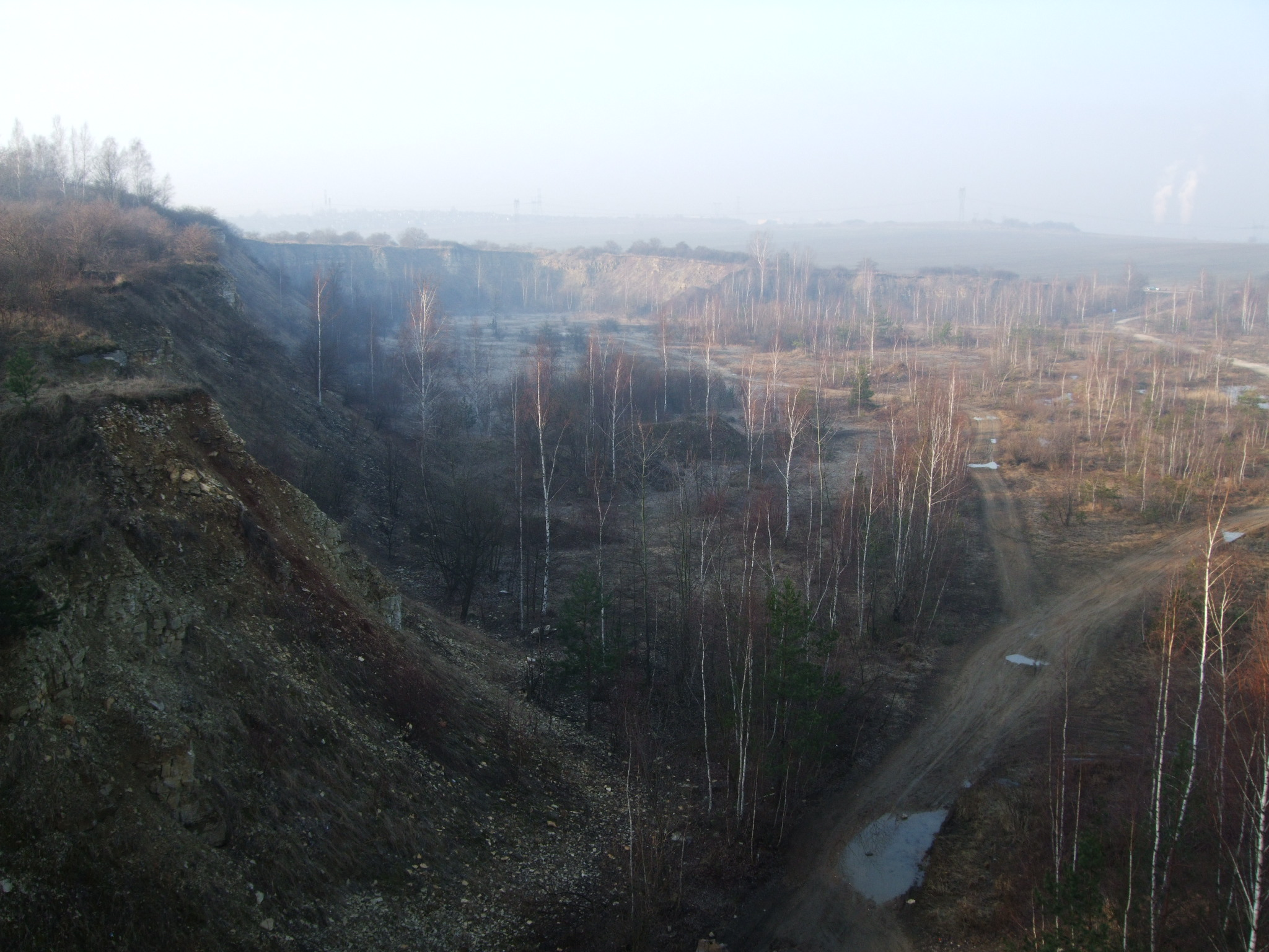 Nieczynne wyrobisko po kopalni dolomitu u podnóża Góry Sodowej(327m n.p.m.)